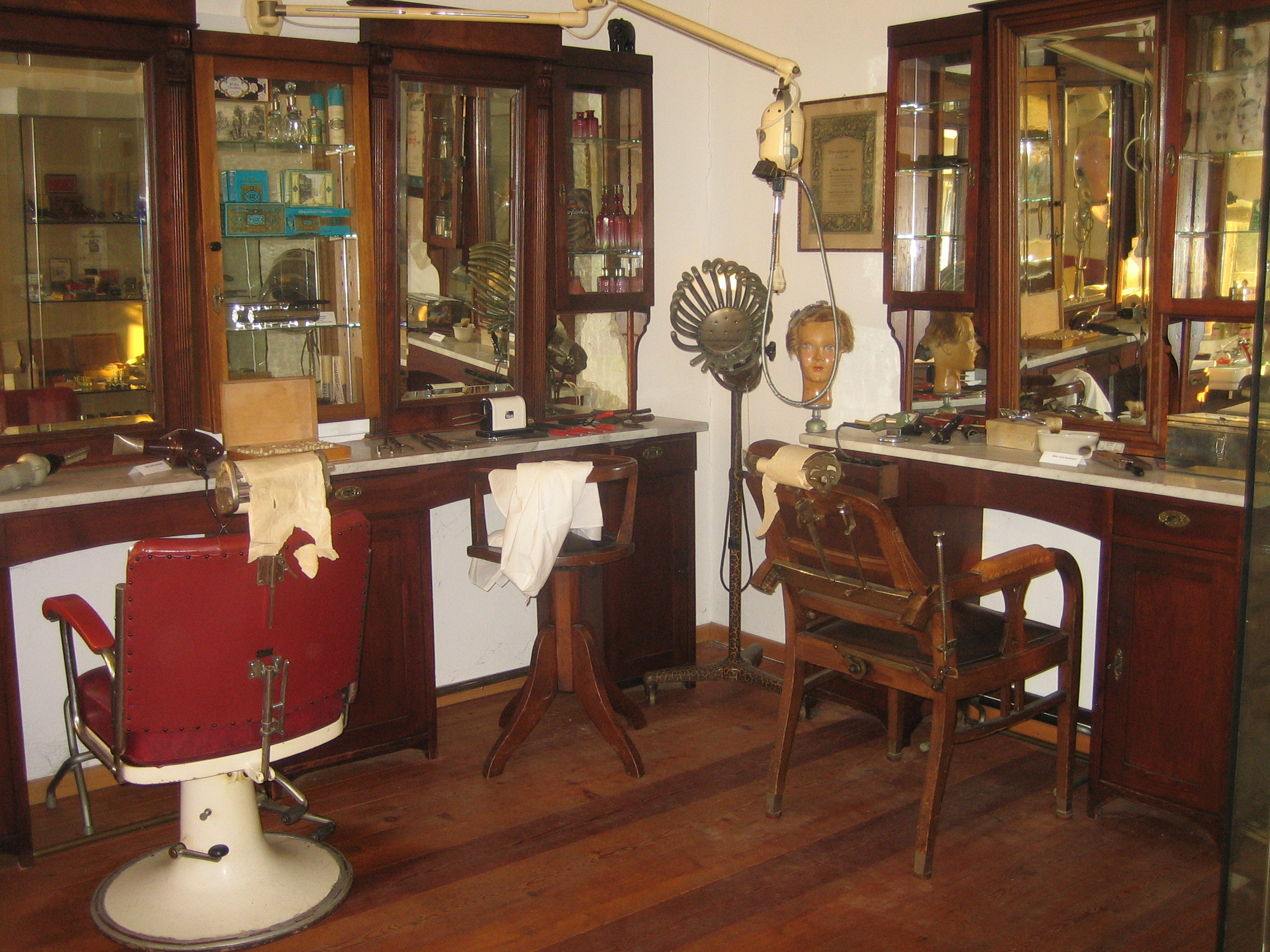 Ein alter Frisörsalon aus Berne ist heute im Handwerksmuseum Ovelgönne zu sehen und noch viel mehr.